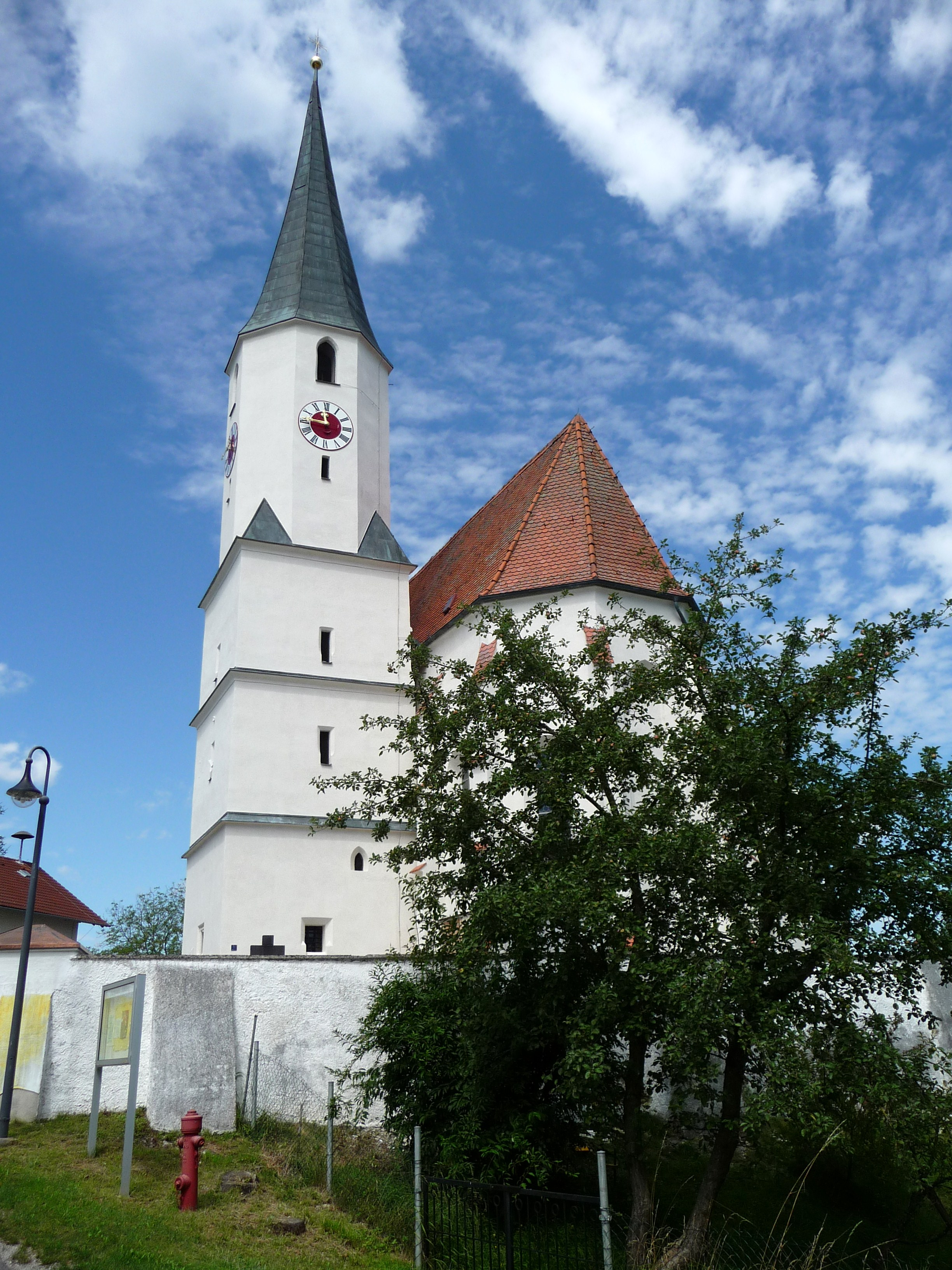 Die Pfarrkirche St. Georg und St. Ulrich in Stubenberg